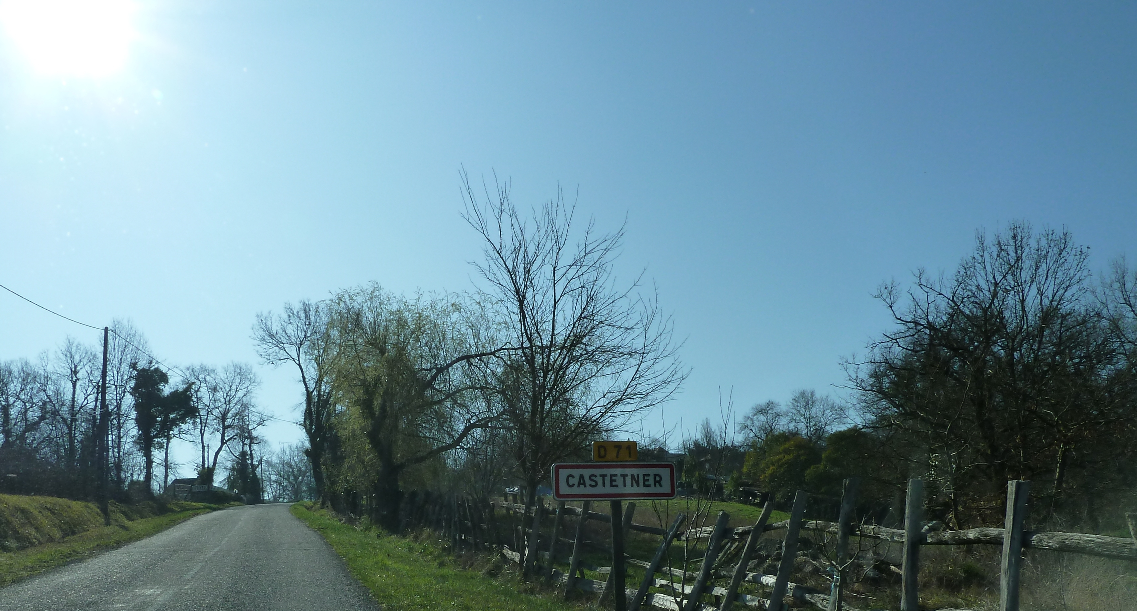 Entrée dans Castetner